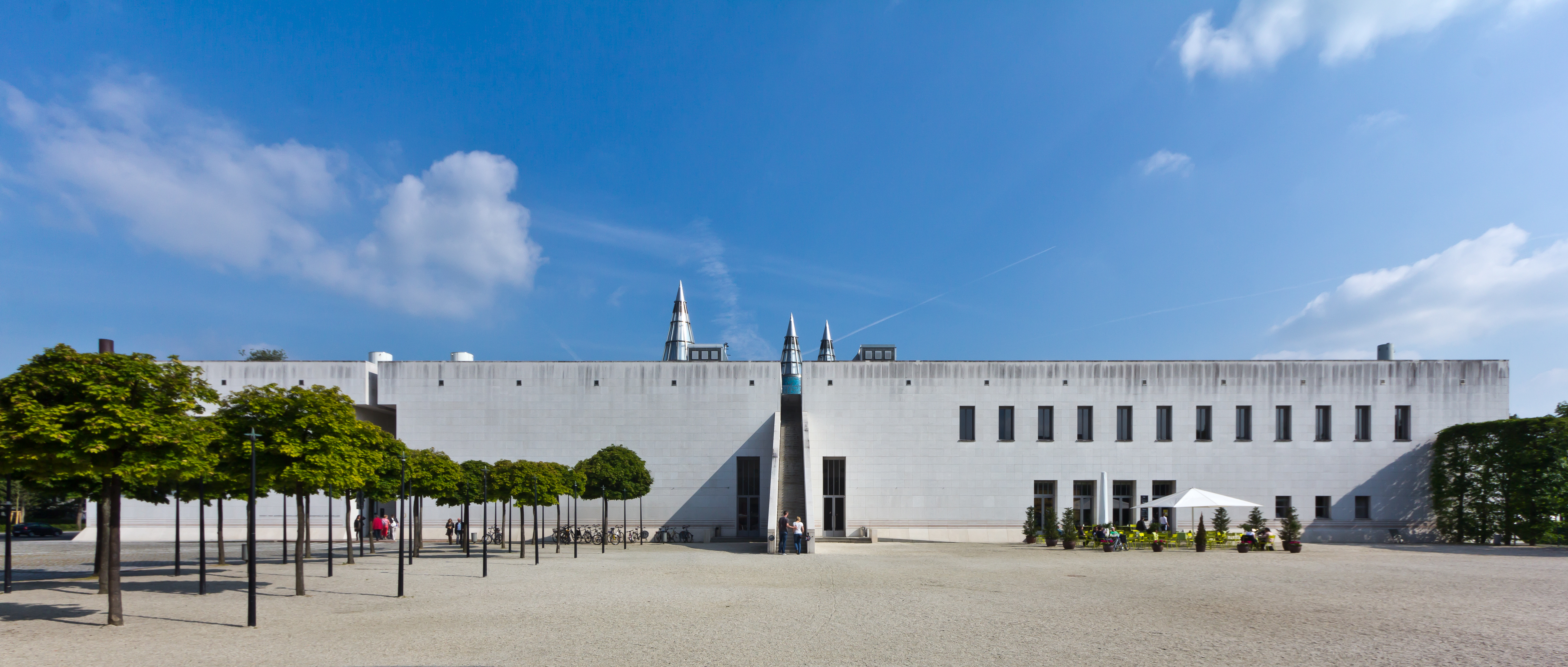 Kunst- und Ausstellungshalle der Bundesrepublik Deutschland - Bundeskunsthalle